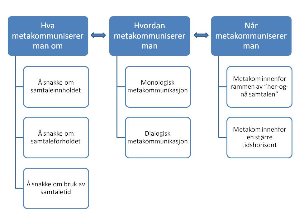 Dette er modell som beskriver hvordan vi metakommuniserer. Modellen er hentet fra en bok jeg selv har skrevet. Baltzersen, Rolf K. (2008) Å samtale om samtalen. Bergen: Fagbokforlaget.